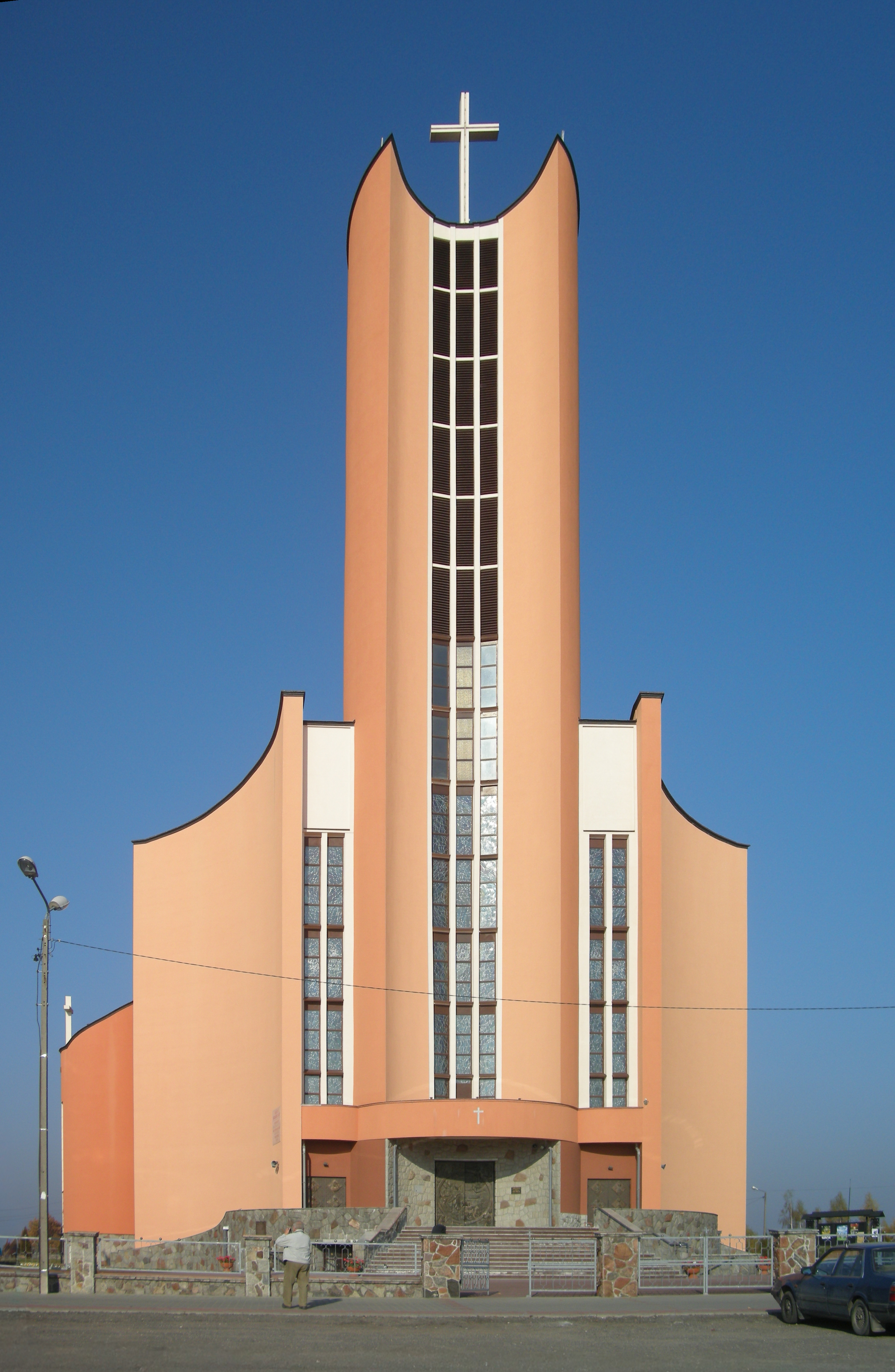 Kościół pw. Błogosławionej Karoliny Kózkówny